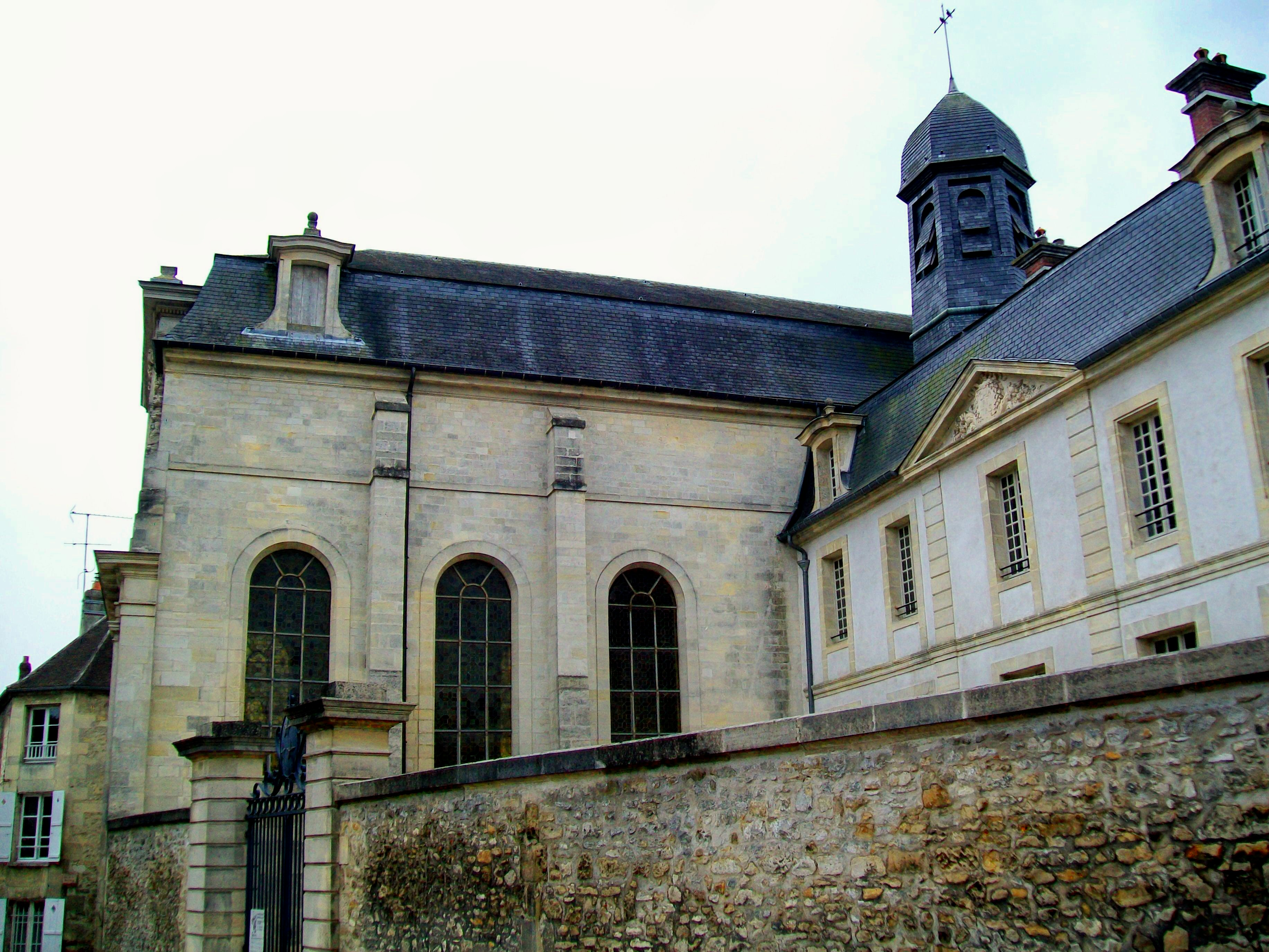 Ancien hôpital de la Charité, vue partielle de l'infirmerie de 1708 depuis la rue de Meaux, avec la chapelle (à. g.).